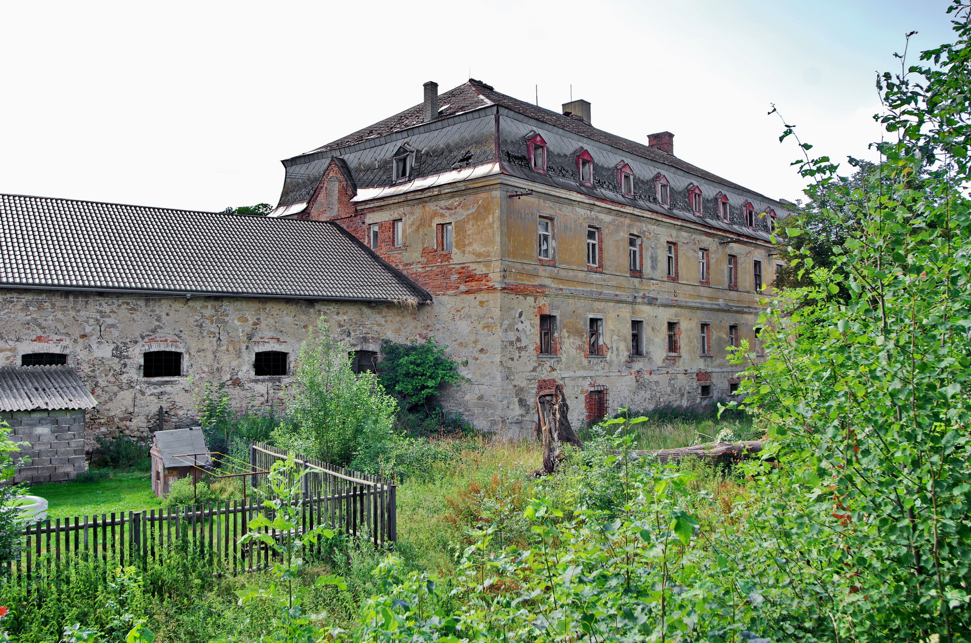 Starý Rybník, část obce Skalná, nový zámek, okres Cheb